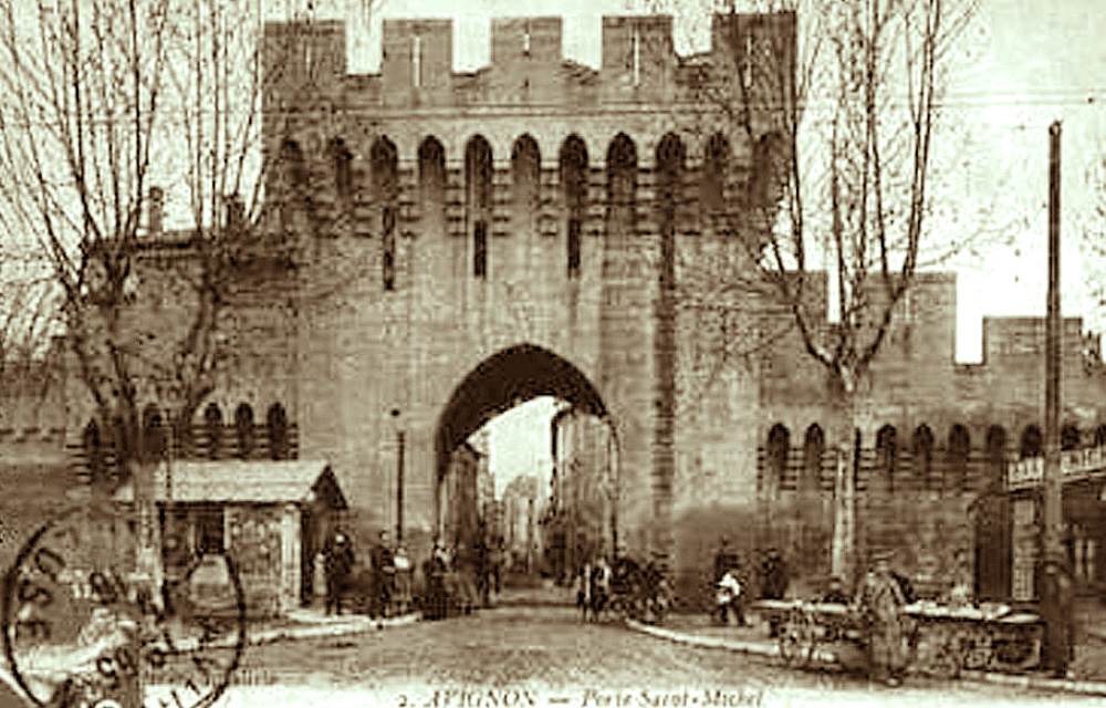 Avignon. Porte Saint-Michel, création de Violet-Leduc